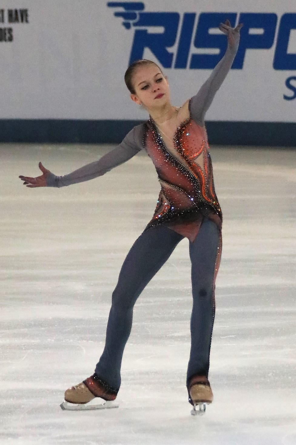 Александра Трусова на чемпионате России по фигурному катанию на коньках 2019